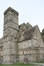 Capilla Carmac, exterior